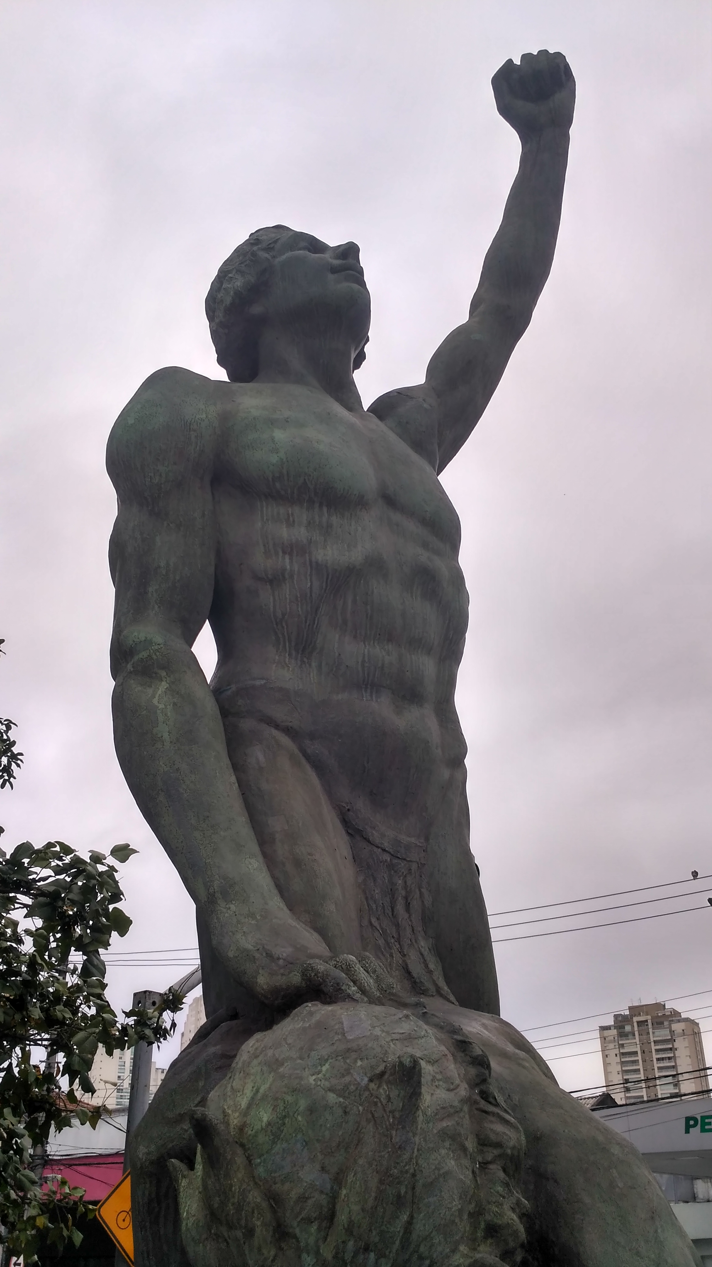 Foto fechada do Monumento Ubirajara, em São Paulo, Brasil.